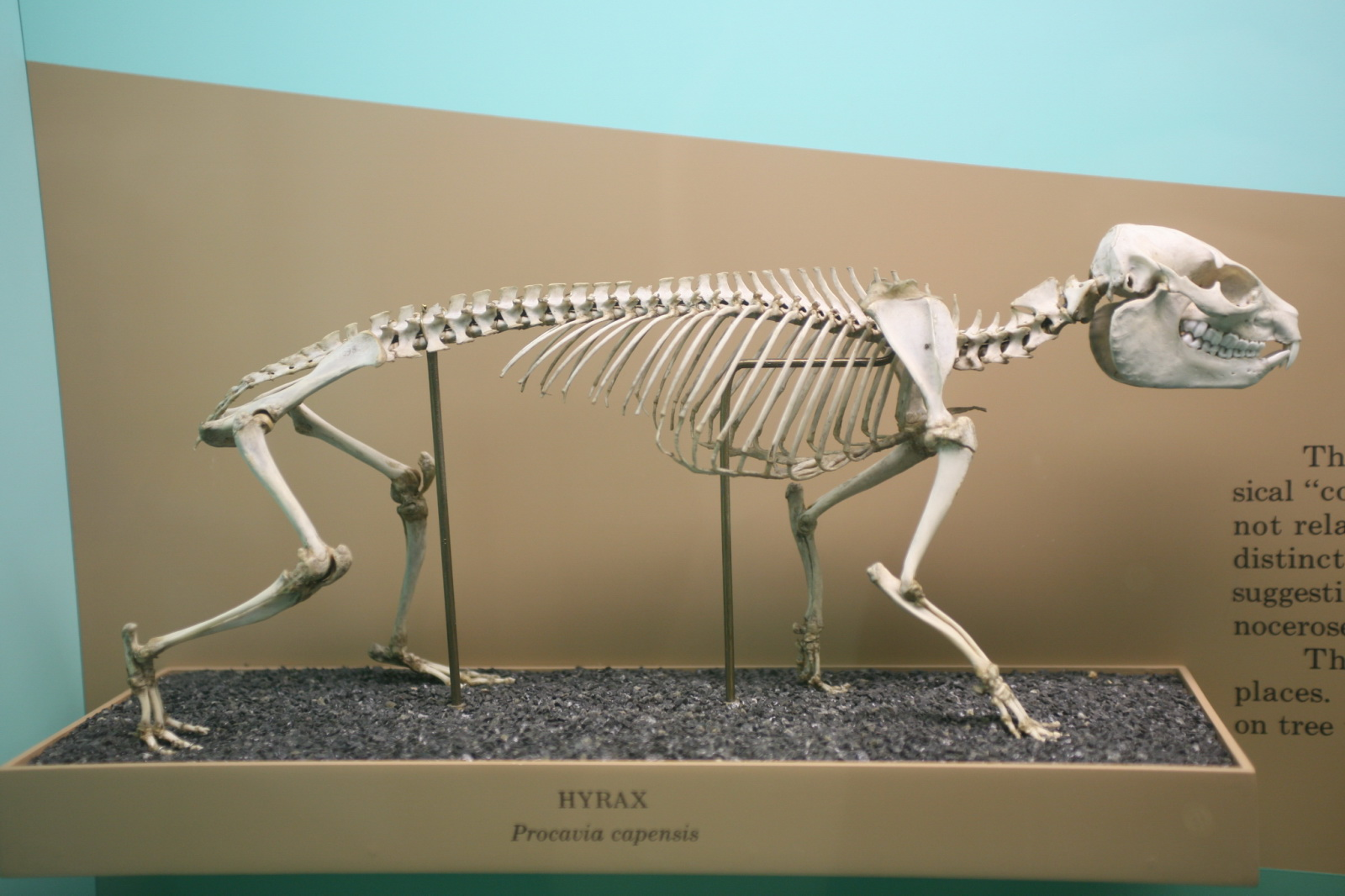 Procavia capensis skeleton